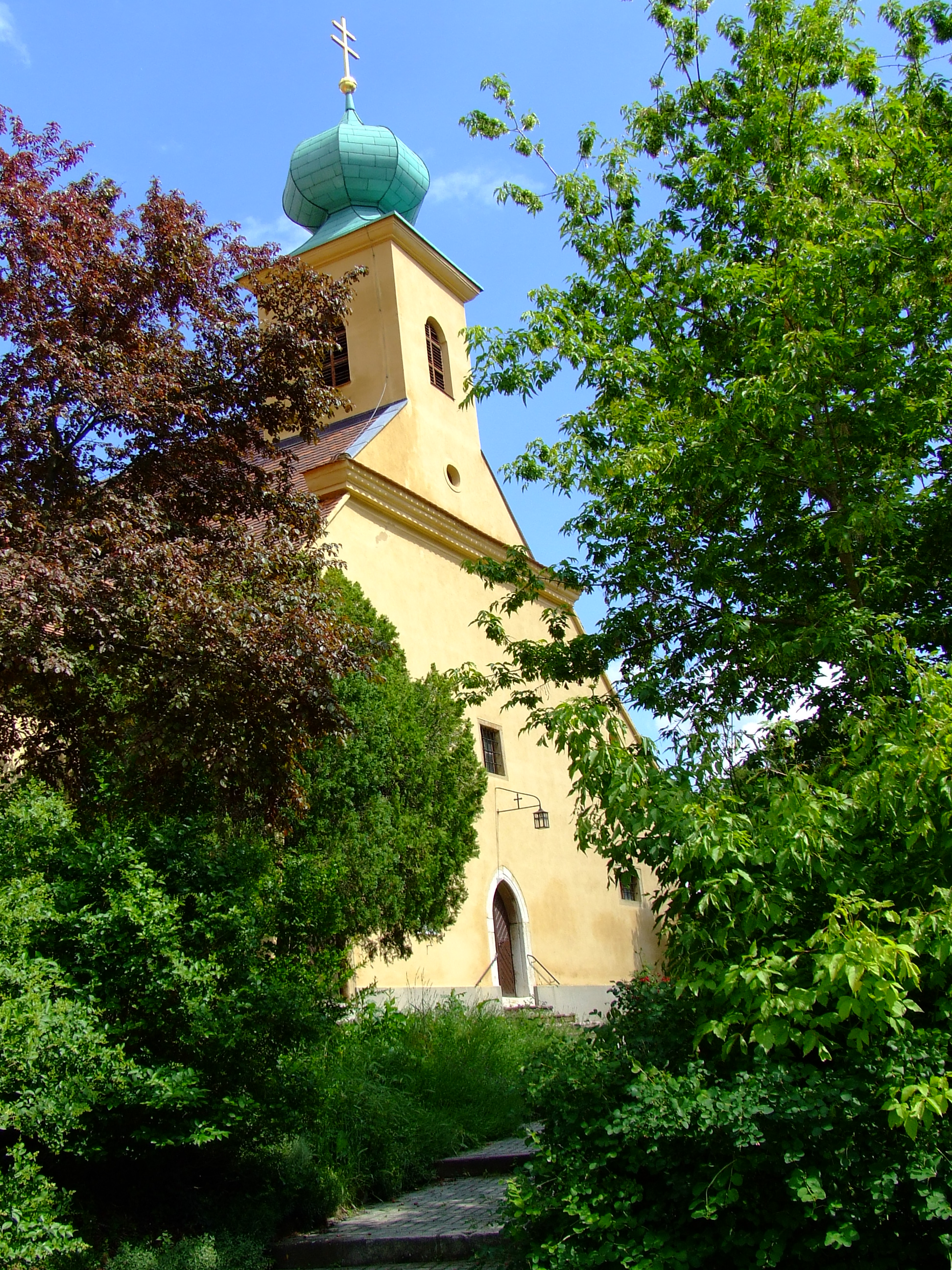 A Mindenszentek-templom Pécsen. Épült a 12. században román stílusban. Gótikus és barokk átalakításokat is végeztek rajta. 1588-ban itt zajlott le a Pécsi disputa néven ismert hitvita